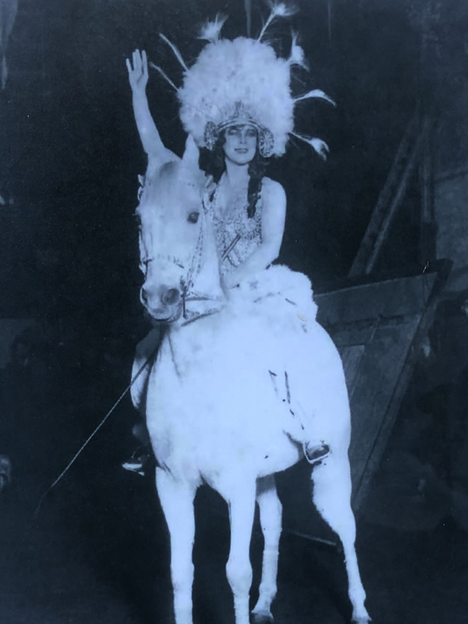 Cirkushästen Menelik och Barbara Meijares-Schreiber